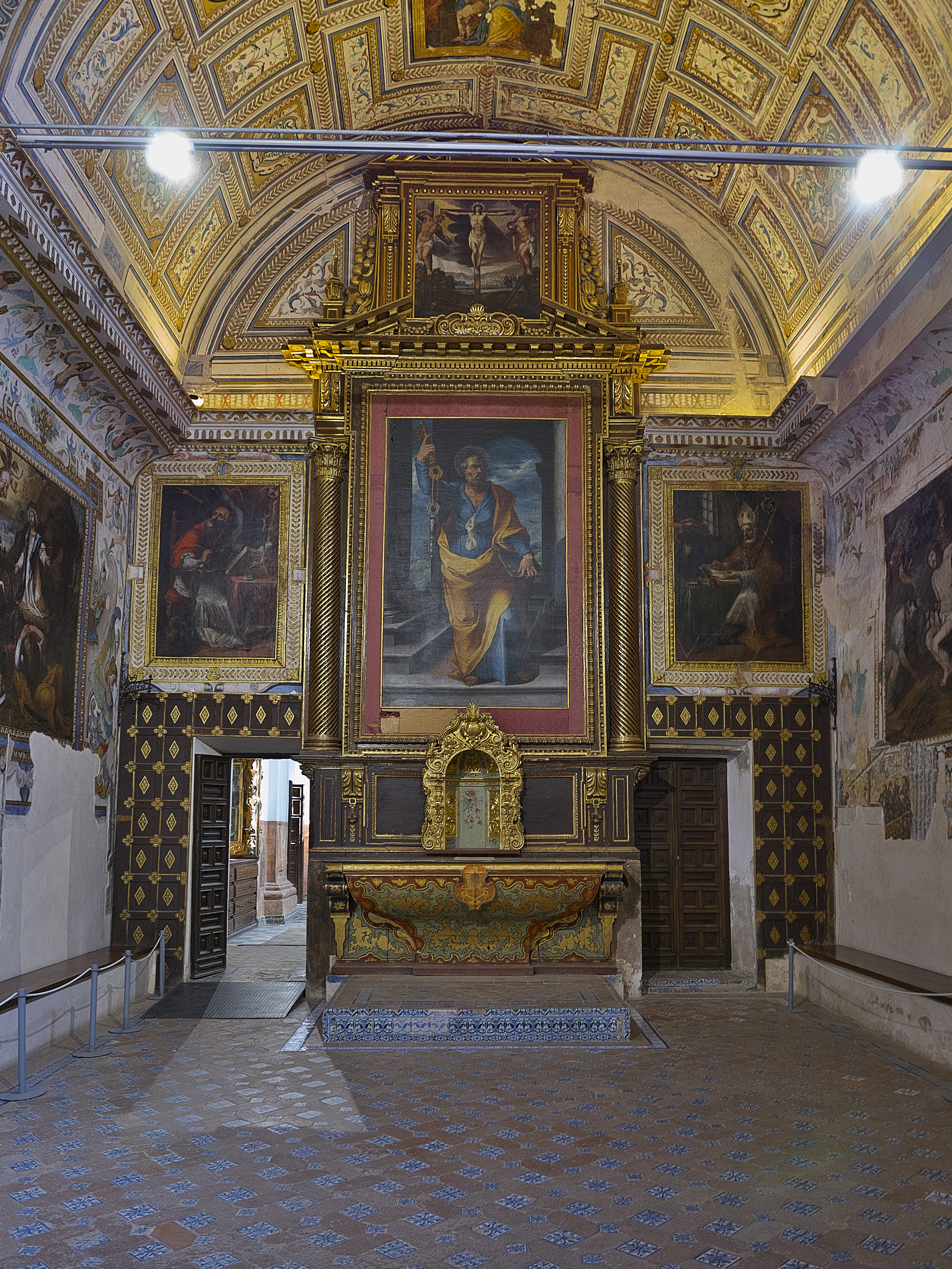 En el siglo XVII se altera sustancialmente este espacio, quedando oculta la decoración del XV. El retablo es obra de Luis de Figueroa, escultor de la confianza de Juan Martínez Montañés.